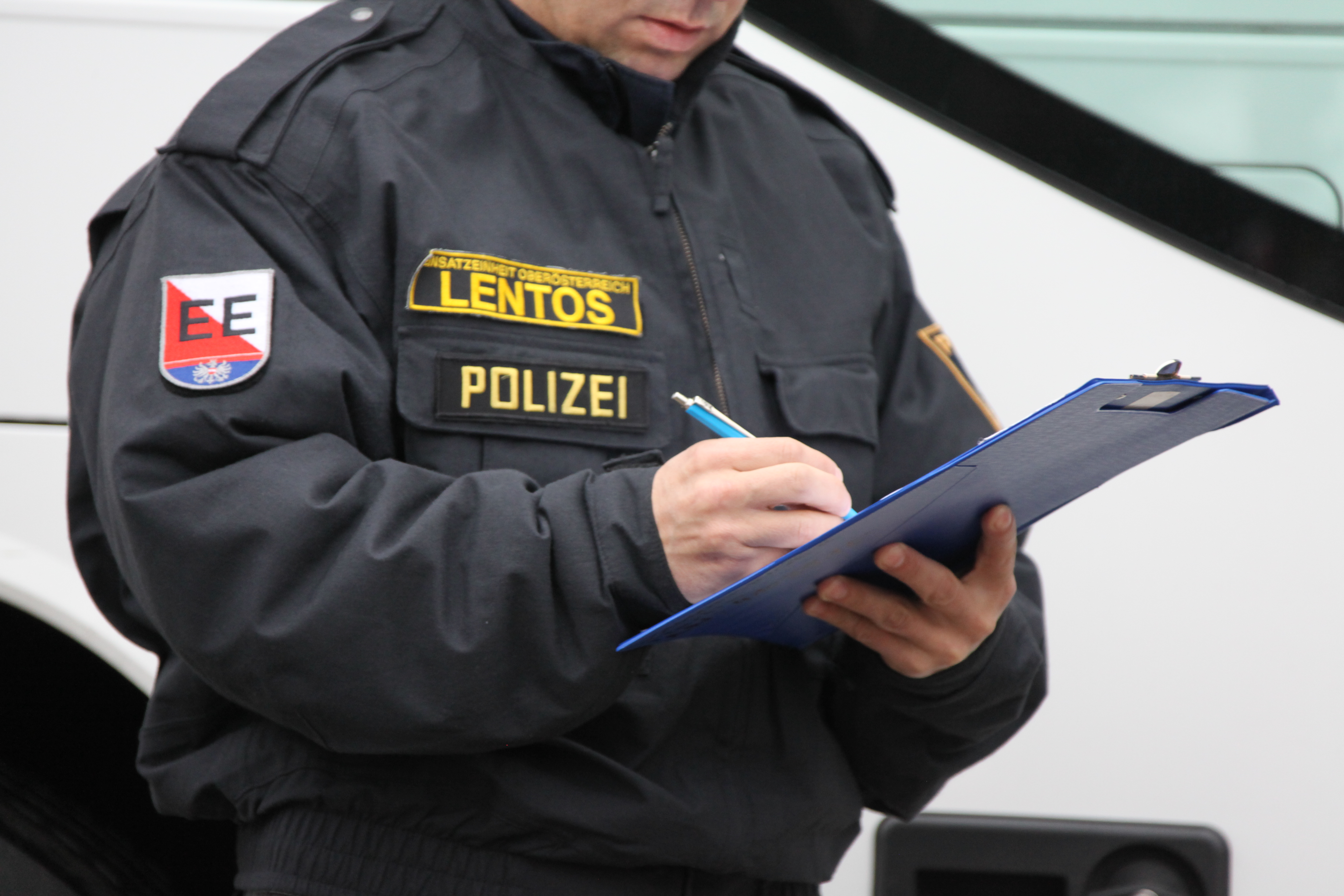 Österreichischer Polizist am Grenzübergang Oberösterreich / Deutschland Immigrantenabfertigung 17.11.2015 - WEGSCHEID-HANGING